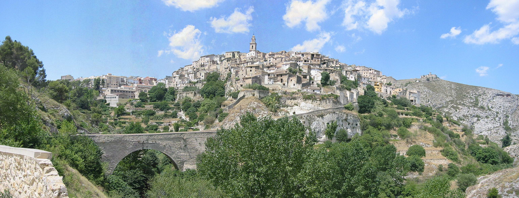 Calvari de Bocairent, Vall d'Albaida, València